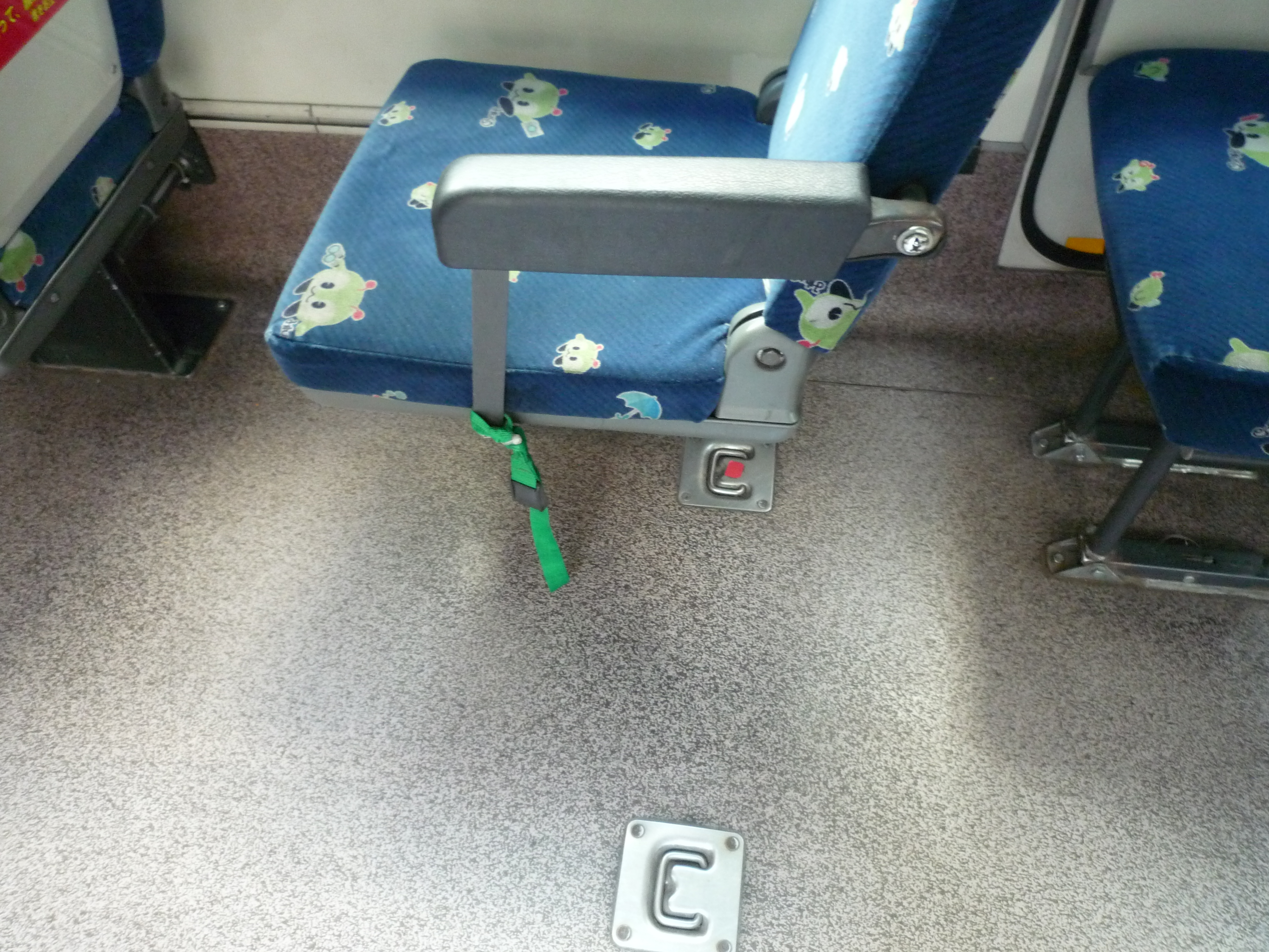 ベビーカーをスロープからそのまま乗車した際に、後ろ向きに固定したうえでこのベルトで押さえるというもの。ただし、車椅子利用者がいる場合は利用できない。